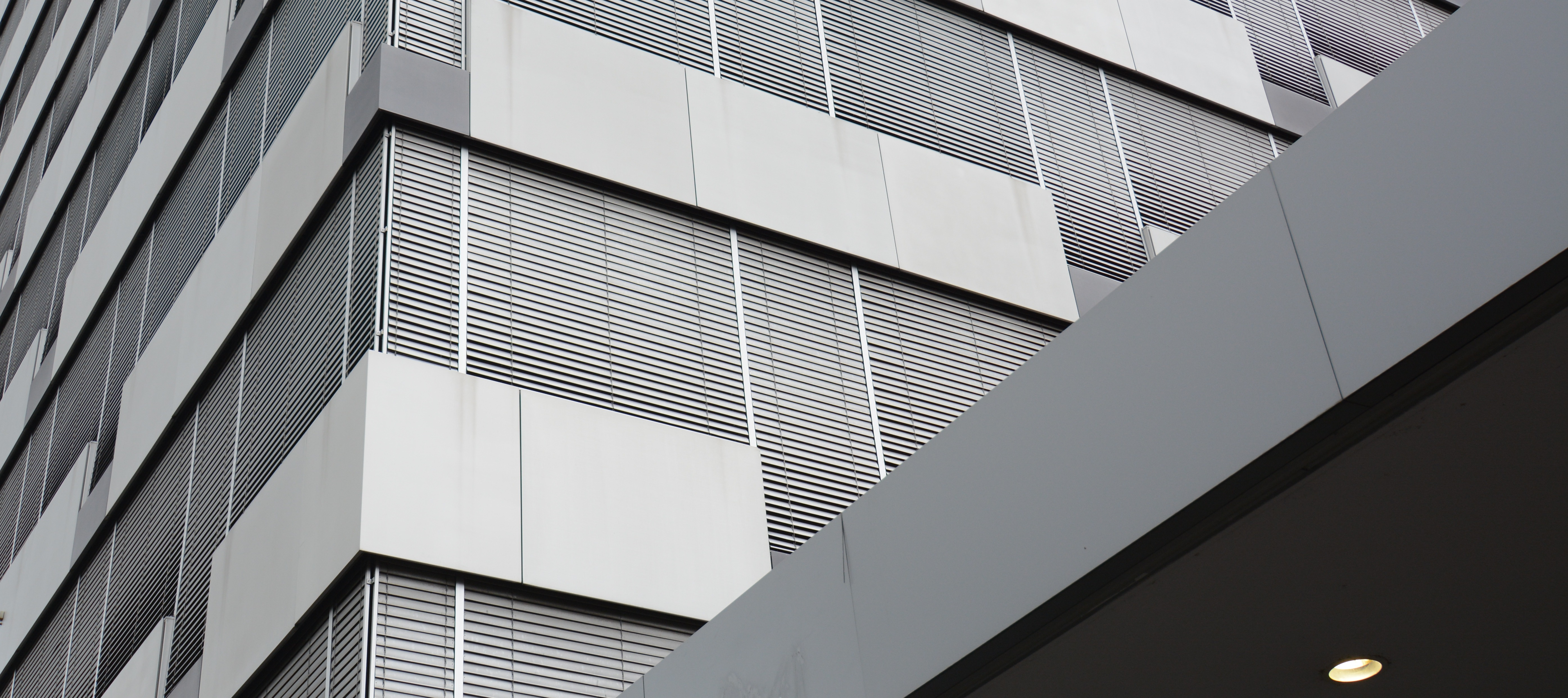 Alusuisse Hochhaus, Zürich Altstetten. Architekt: Werner Stücheli